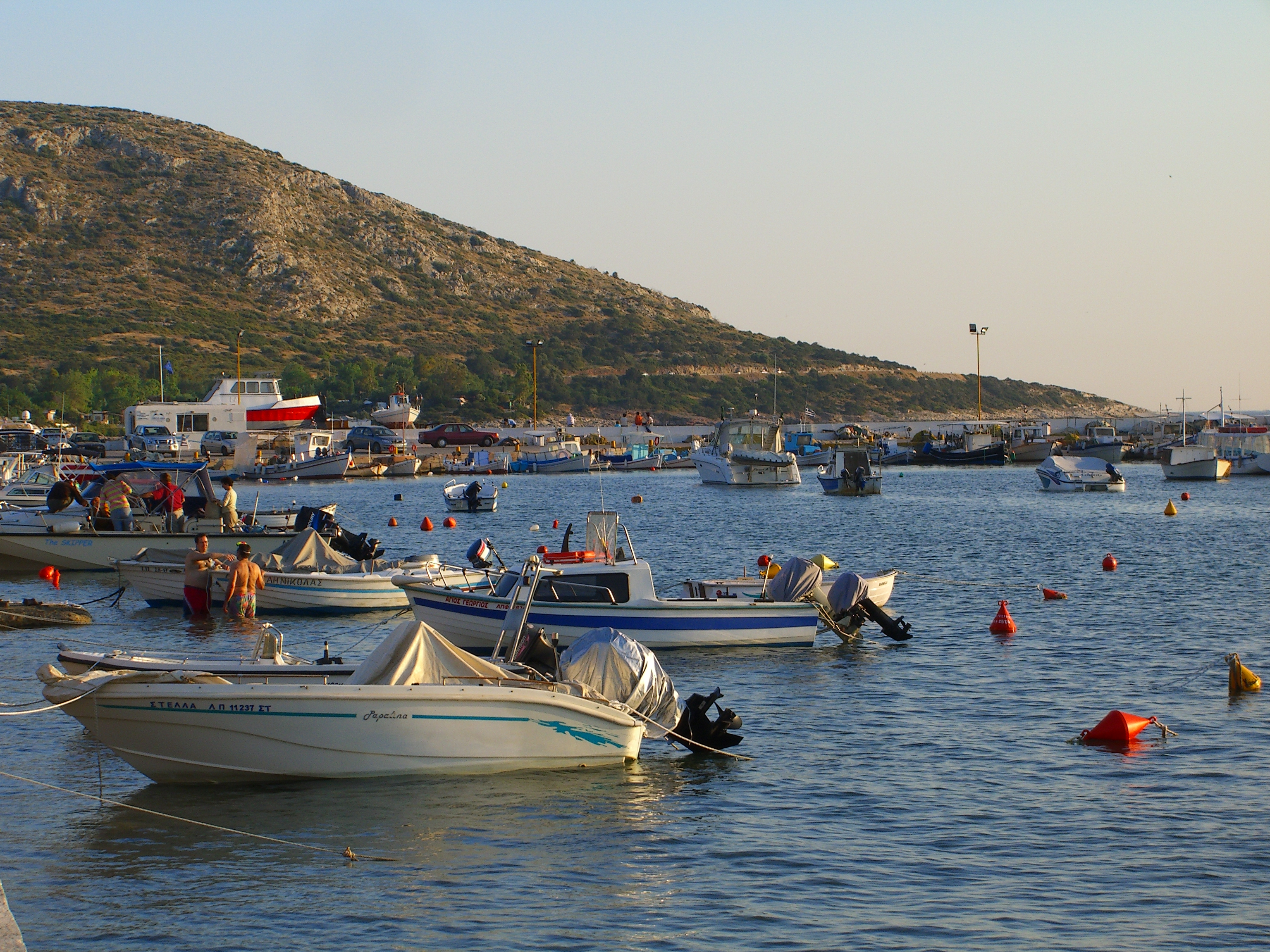 Palaia Fokaia 190 13, Greece